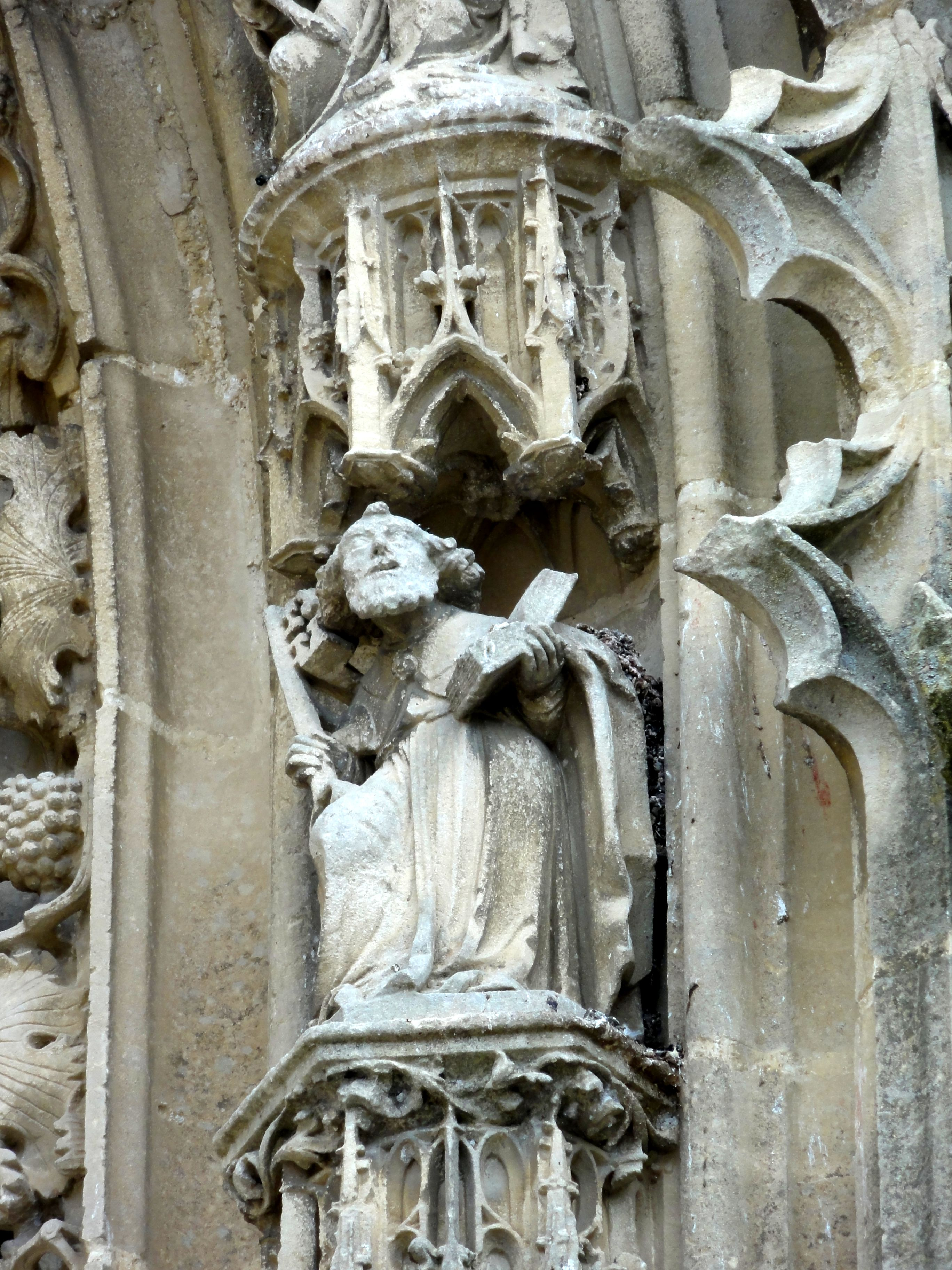 Statuette du portail.